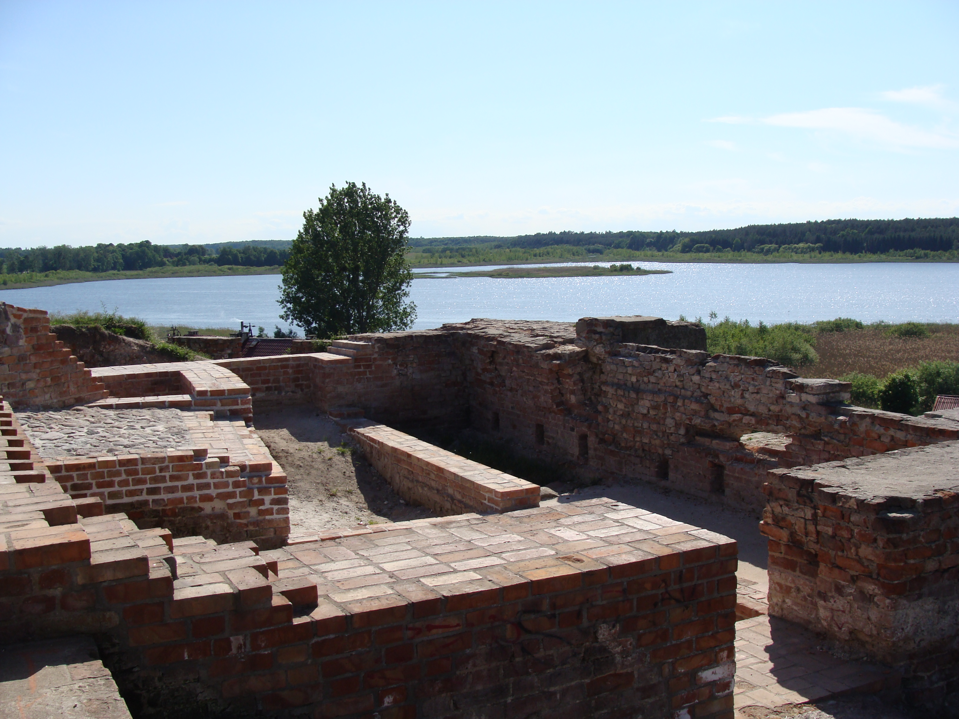 Prabuty, ul. Miła / ul. Mazurska - relikty zamku biskupiego (zabytek nr 87)